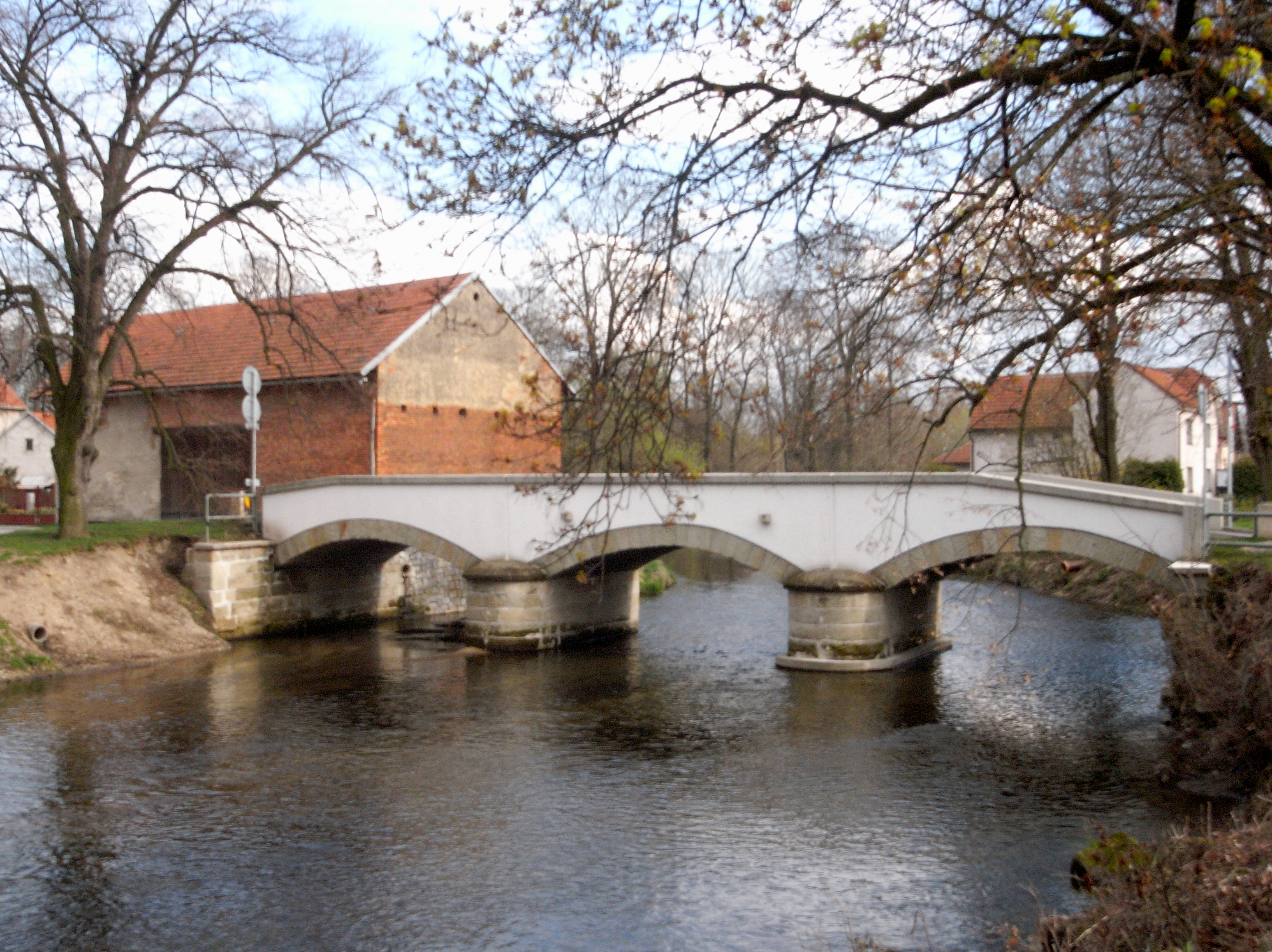 Silniční most (Lozice), Lozice